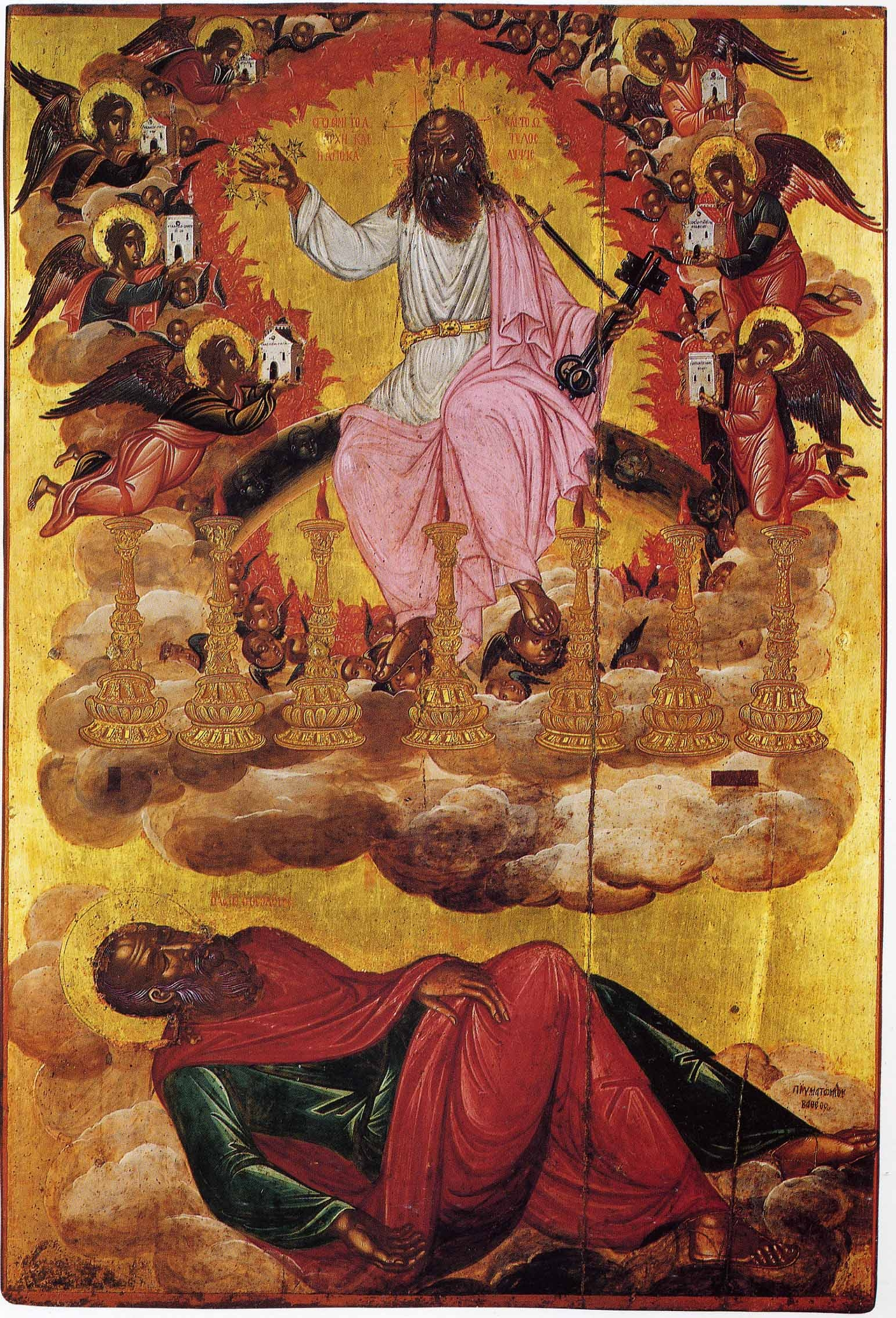 АПОКАЛИПСИС из монастыря Апокалипсиса на о. Патмос ок. 1594 г. Мастер Томас Вафас